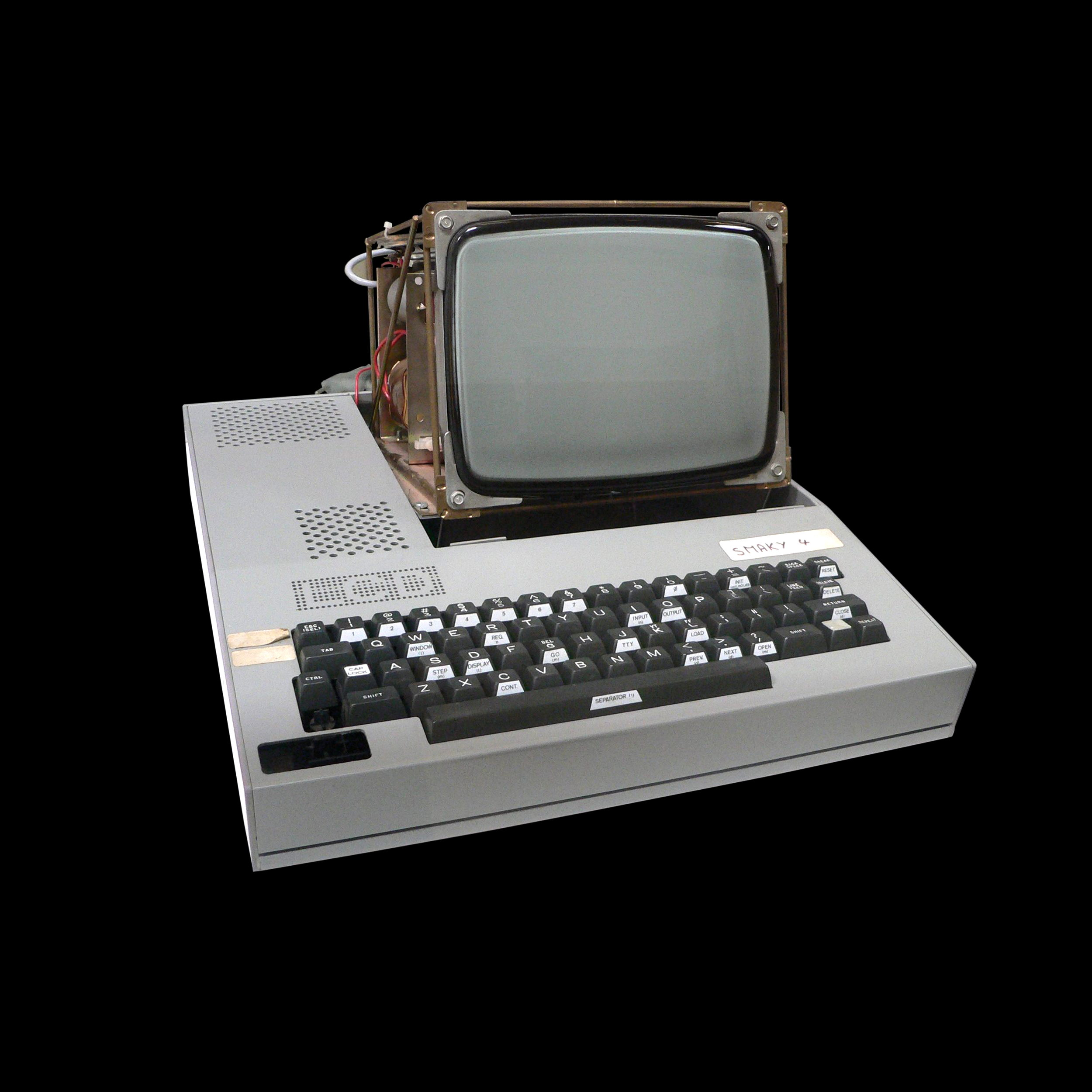 Smaky-4 computer. On display at the Musée Bolo, EPFL, Lausanne. On display at the Musée Bolo, EPFL, Lausanne.